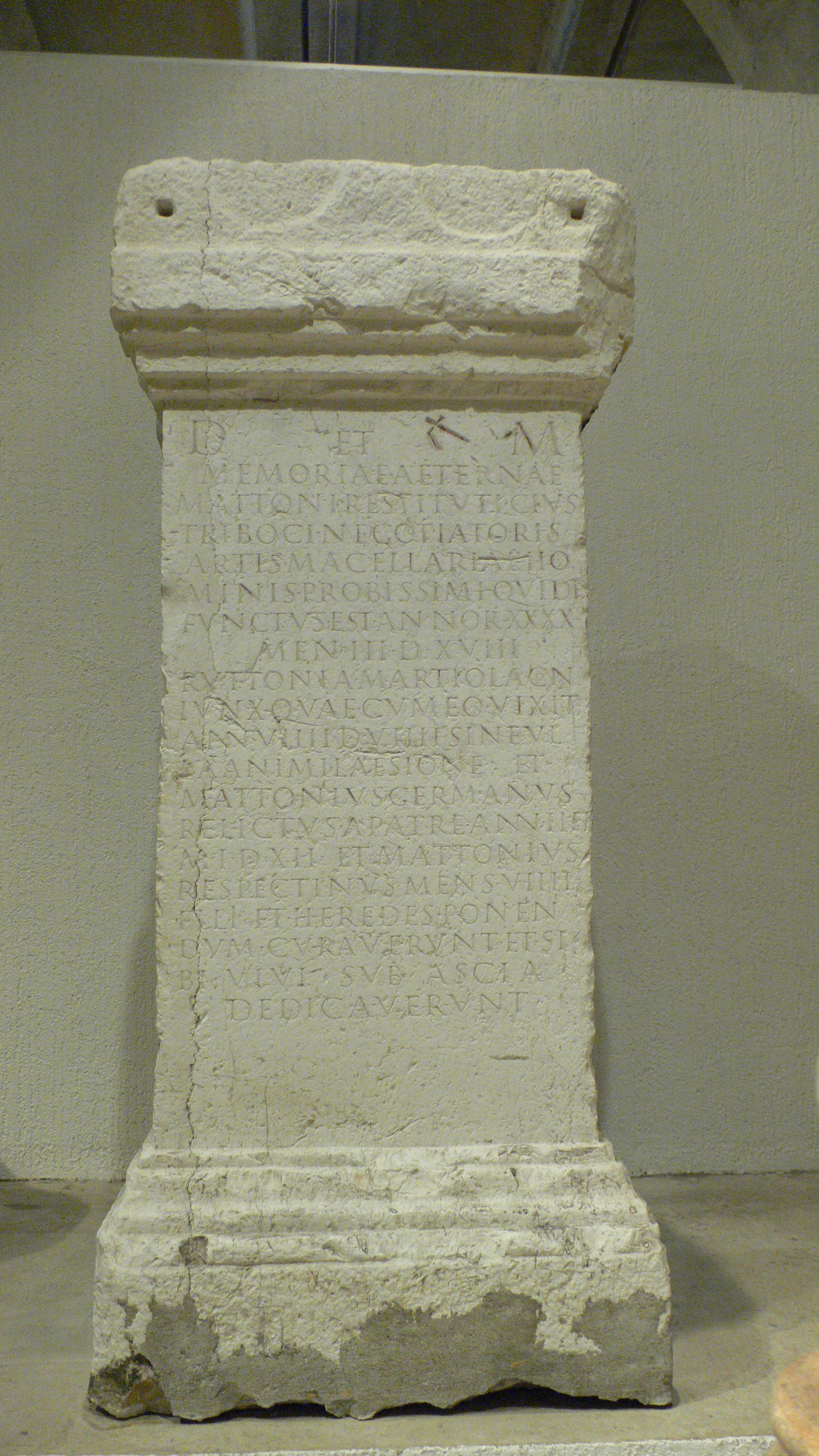 Musée gallo-romain de Fourvière (Lyon) - Cippe retrouvé en 1552 dans les jardins de l'Obéancier près de Saint-Just à Lyon : D(iis) M(anibus) / et memoriae aeternae / M(arcus) Attoni(i) Restituti, civis / Triboci, negotatioris / artis macellariae, ho/minis probissimi qui de/ functus est annor(um) XXXX, / men(sium) IIi, d(ierum) XVIII ; / Ruttonia Martiola con/iunx, quae cum eo vixit / ann(os) VIIII, sine ul/la animi laesione, et / M(arcus) Attonius Germanus / relictus a patre ann(orum) IIII, / m(ensis) I, d(ierum) XII et M(arcus) Attonius / Respectinus mens(ium) VIIII, / filii et heredes ponen/dum curaverunt et si/bi sub ascia / dedicaverunt : Aux dieux Mânes et à la mémoire éternelle de Marcus Attonius Restitutus, de la cité des Triboques, négociant marchand de comestibles, homme d'une extrême probité, mort à l'âge de 40 ans, 3 mois et 18 jours ; Ruttonia Martiola, sa femme, qui a vécu avec lui 9 ans et 9 jours sans qu'il lui ait jamais fait aucune peine, et Marcus Attonius Germanus, privé de son père à l'âge de 4 ans, 1 mois et 12 jours, et Marcus Attonius Respectinus à l'âge de 9 mois, ses fils et héritiers, ont, de leur vivant, élevé ce tombeau, et aussi pour eux-mêmes, et l'ont dédié sous l'ascia.